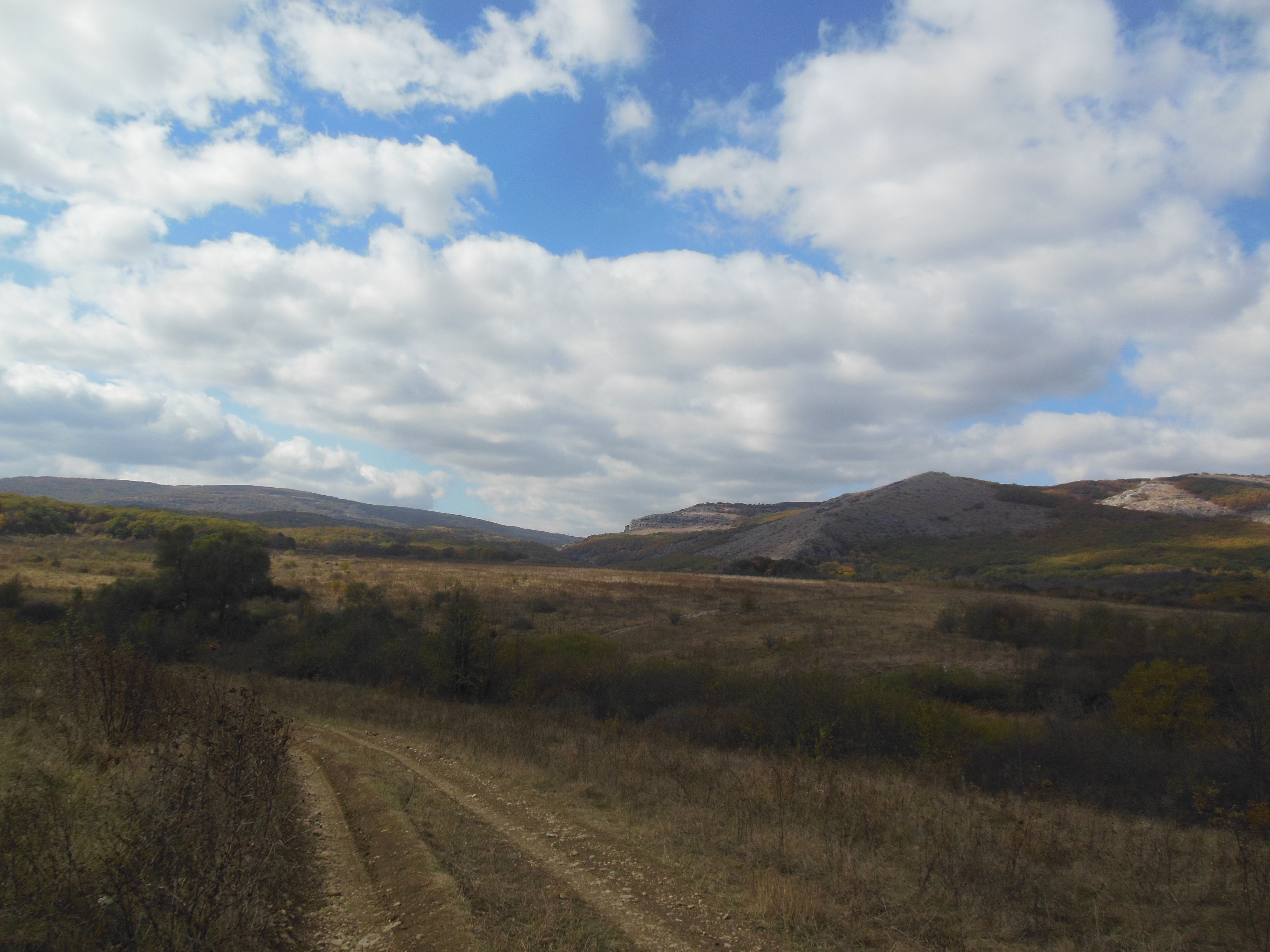 Молбайская котловина, , Крым.